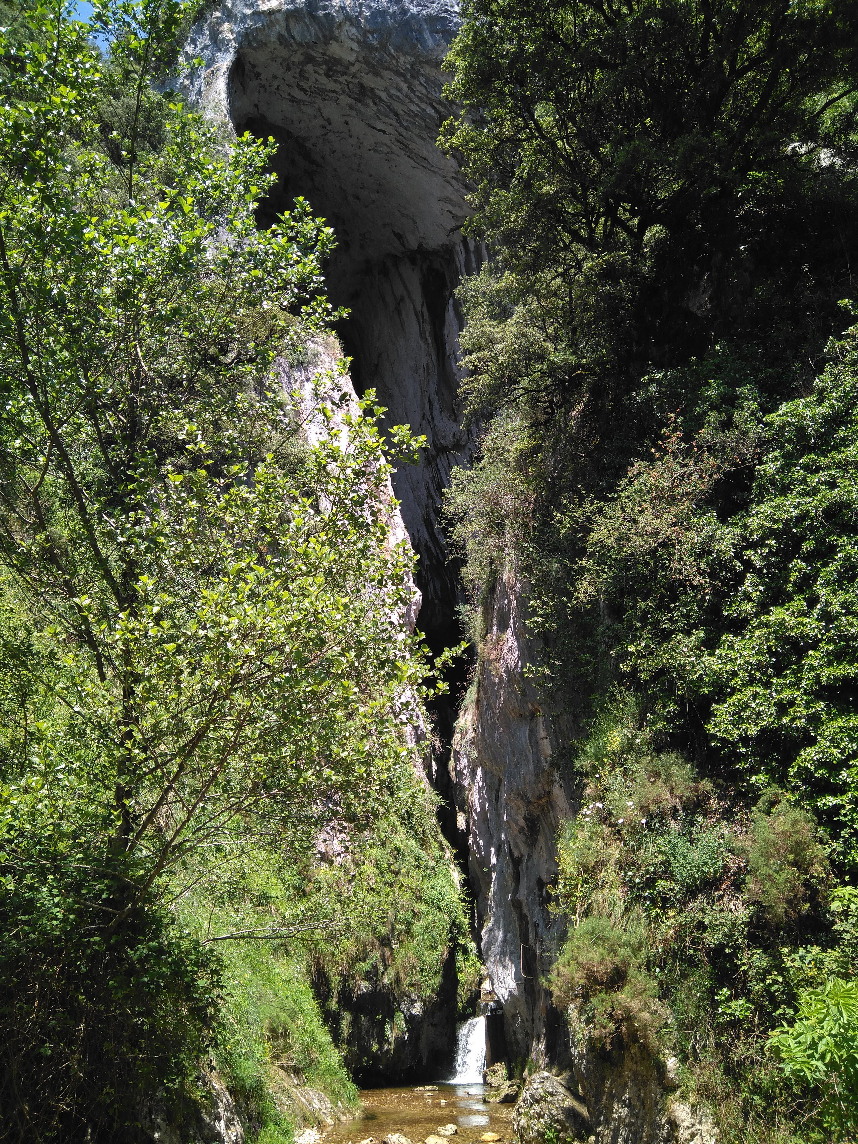 Barranco-cueva que cruza de norte a sur un macizo calizo de la Sierra de Altzania (Álava) también denominado La Lece